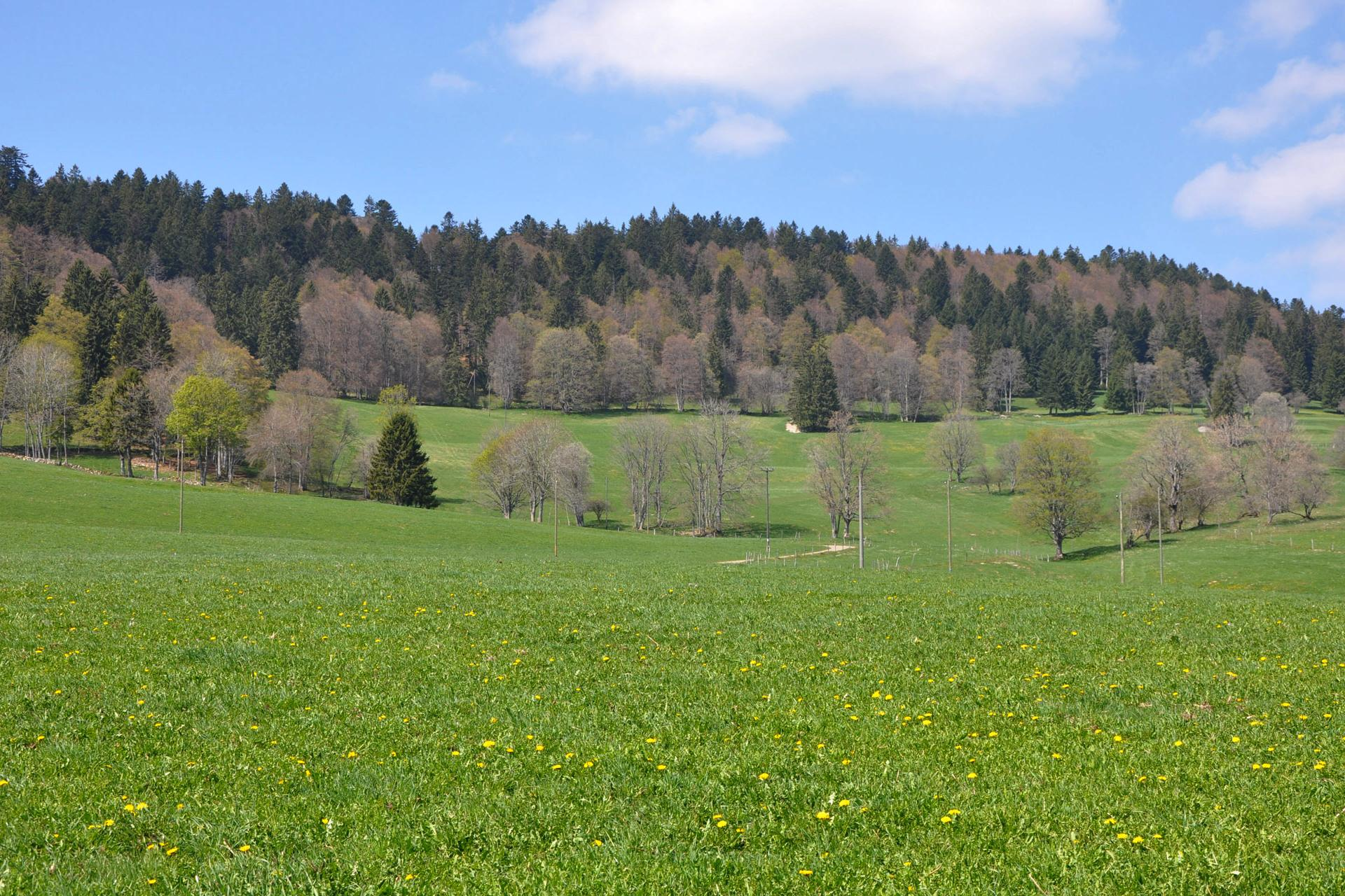 Jura Landschaft Ausgangs La Sagne Richtung Les Ponts-de-Martel im Vallée de La Sagne, auch als Vallée des Ponts bezeichnet, des Neuenburger Juras.